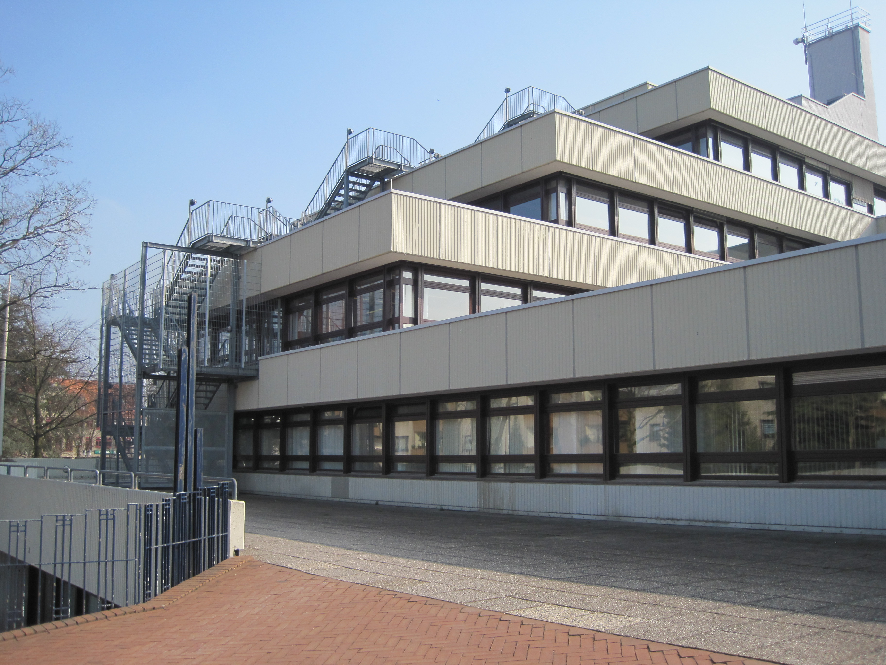 Das Foto zeigt die Außentreppen des Rathauses Bockum-Hövel.